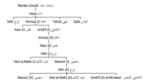 Stammbaum der Samaniden Kleine Version von Bild:Samaniden.png Sāmān-Chodā سامان خدا, Asad اسد, Nūh نوح, Ahmad (I) احمد, Yahyā يحيى, Ilyās الياس, Nasr نصر, Ismāʿīl (I) اسماعيل, Ahmad (II) احمد, Nasr (II) نصر, Nūh (I) نوح, ʿAbd al-Malik (I) عبد الملك, Mansūr (I) منصور, Nūh (II) نوح, Mansūr (II) منصور, ʿAbd al-Malik (II) عبد الملك, Ismāʿīl (II) al-Muntasir اسماعيل المنتصر.